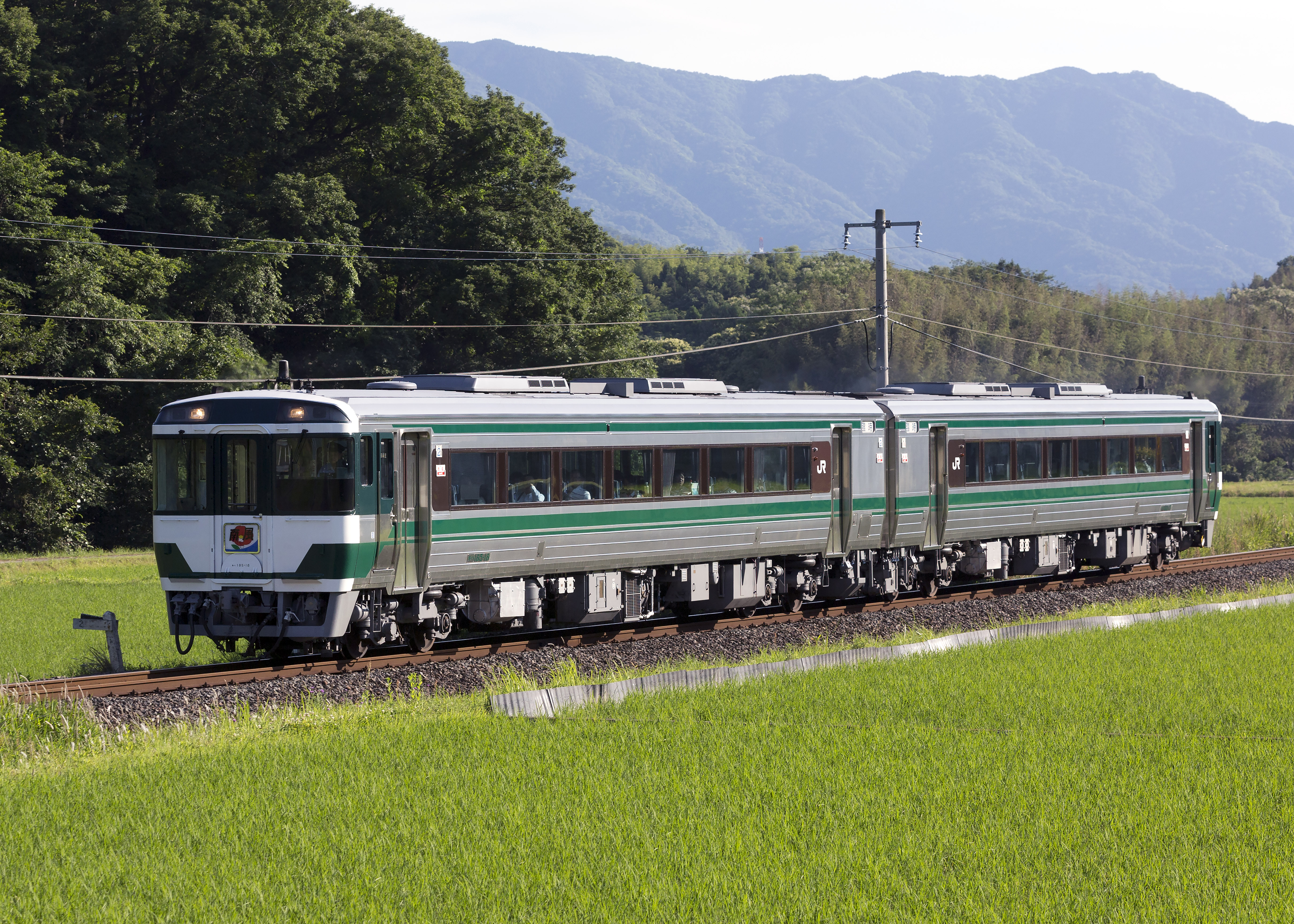 キハ185-18+キハ185-17 南風（団体列車）